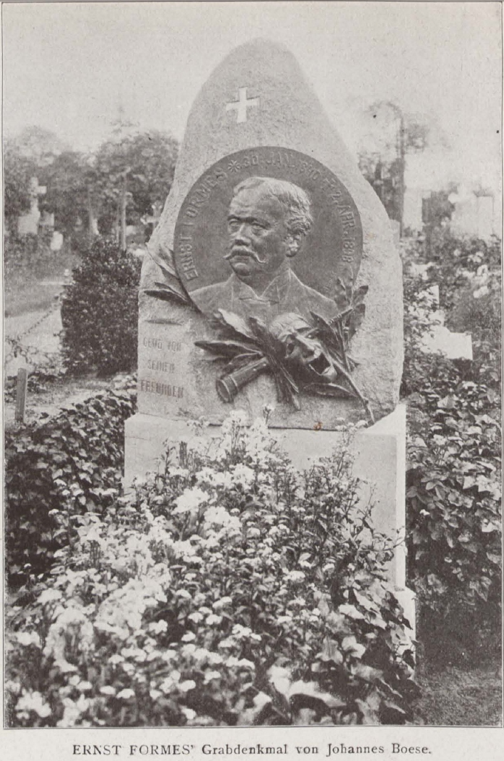 Grabmal des deutschen Schauspielers Ernst Formes (mit einem Porträtrelief des Bildhauers Johannes Boese)auf dem St. Hedwigsfriedhof in Berlin.